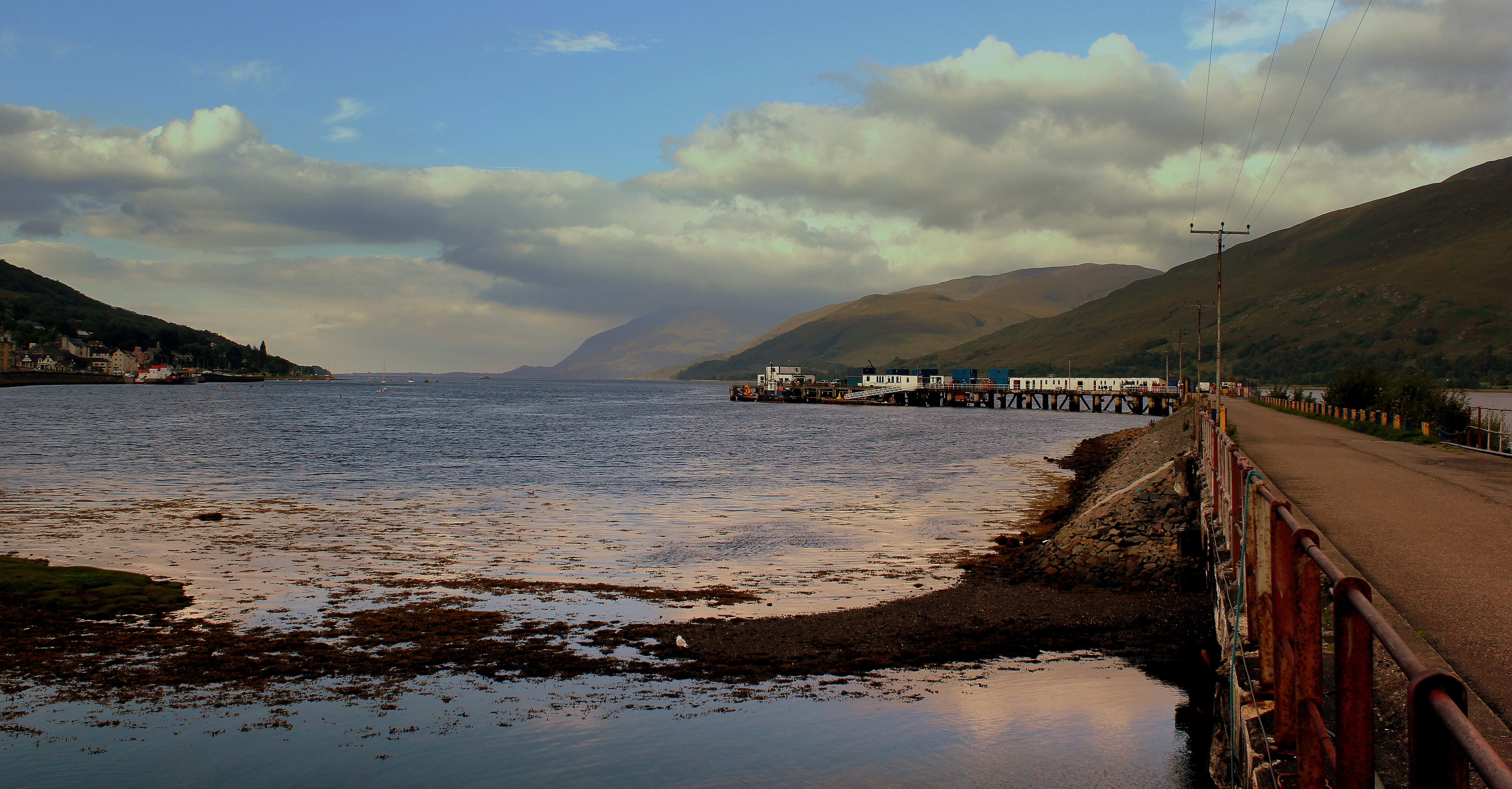 FORT WILLIAM PIER SCOTLAND SEP 2013